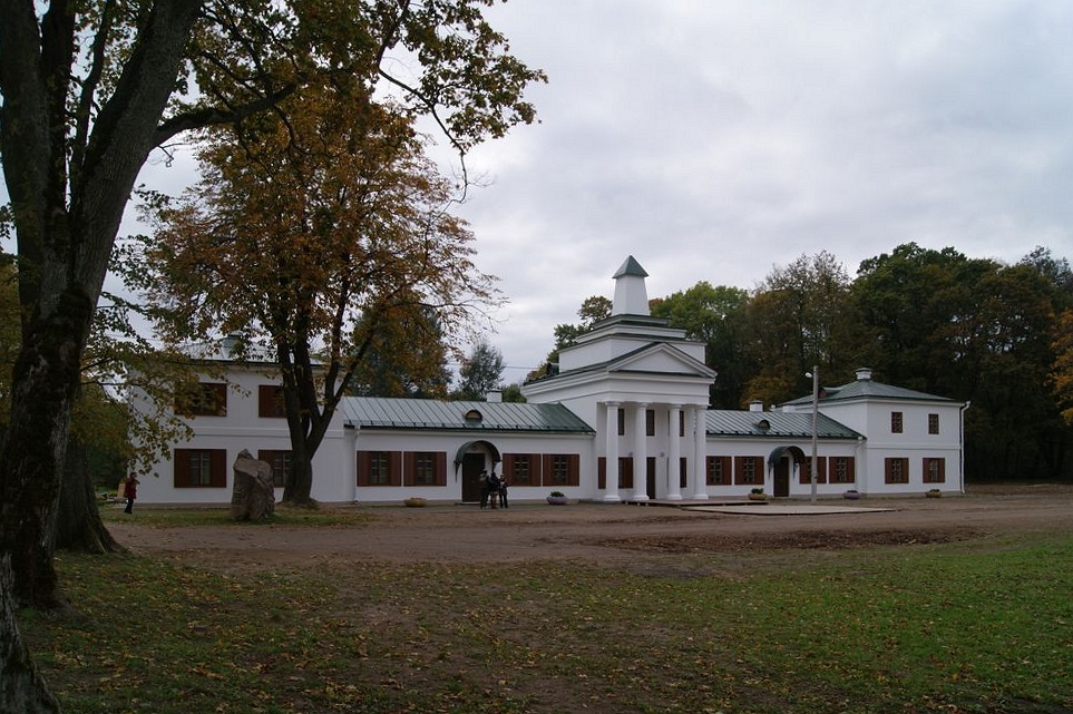 Беларуская (тарашкевіца): Сядзіба Агінскіх у Залесьсі пасьля рэстаўрацыі